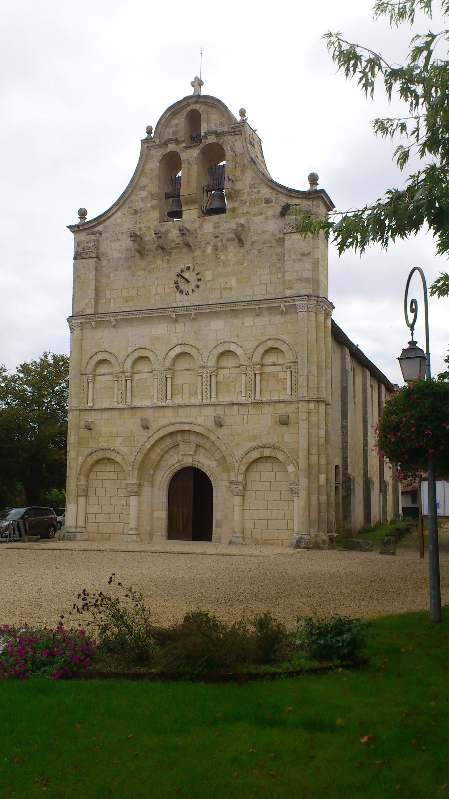 Église Saint-Seurin de Galgon .